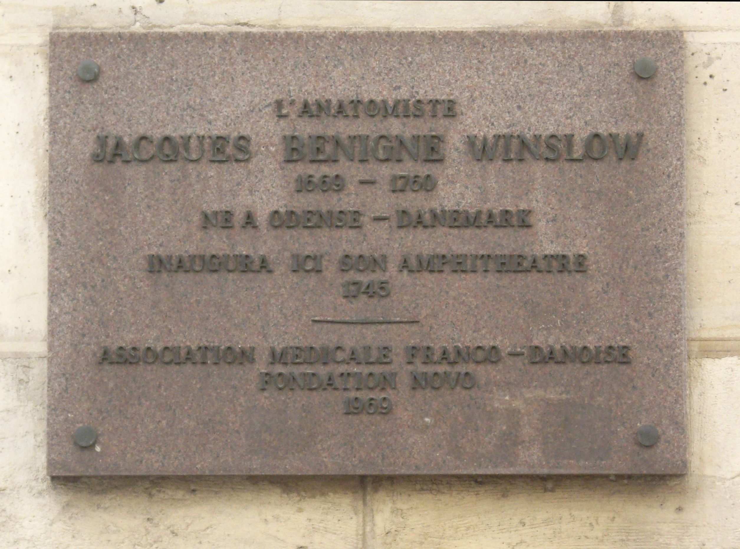 Plaque apposée sur le mur de l'amphithéâtre Winslow, amphithéâtre de la première faculté de médecine de Paris, n° 13/15 de la rue de la Bûcherie, Paris 5e: « L'anatomiste Jacques Bénigne Winslow, 1669-1750, né à Odense, Danemark, inaugura ici son amphithéâtre. 1745. Association médicale franco-danoise. Fondation Novo. 1969. »